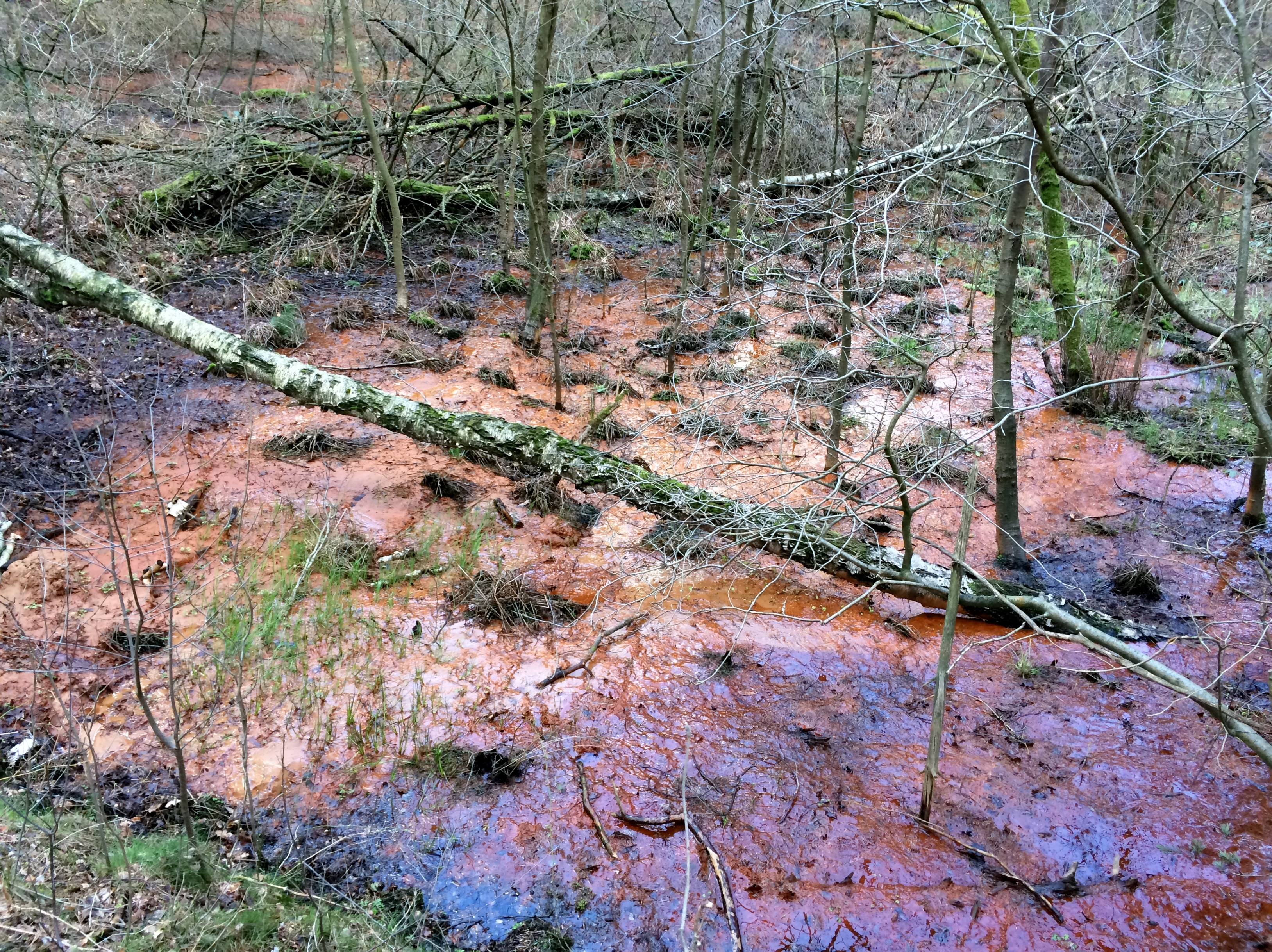 Der Gesundbrunnen ist ein Quellsumpf bei Buckau im Landkreis Potsdam-Mittelmark